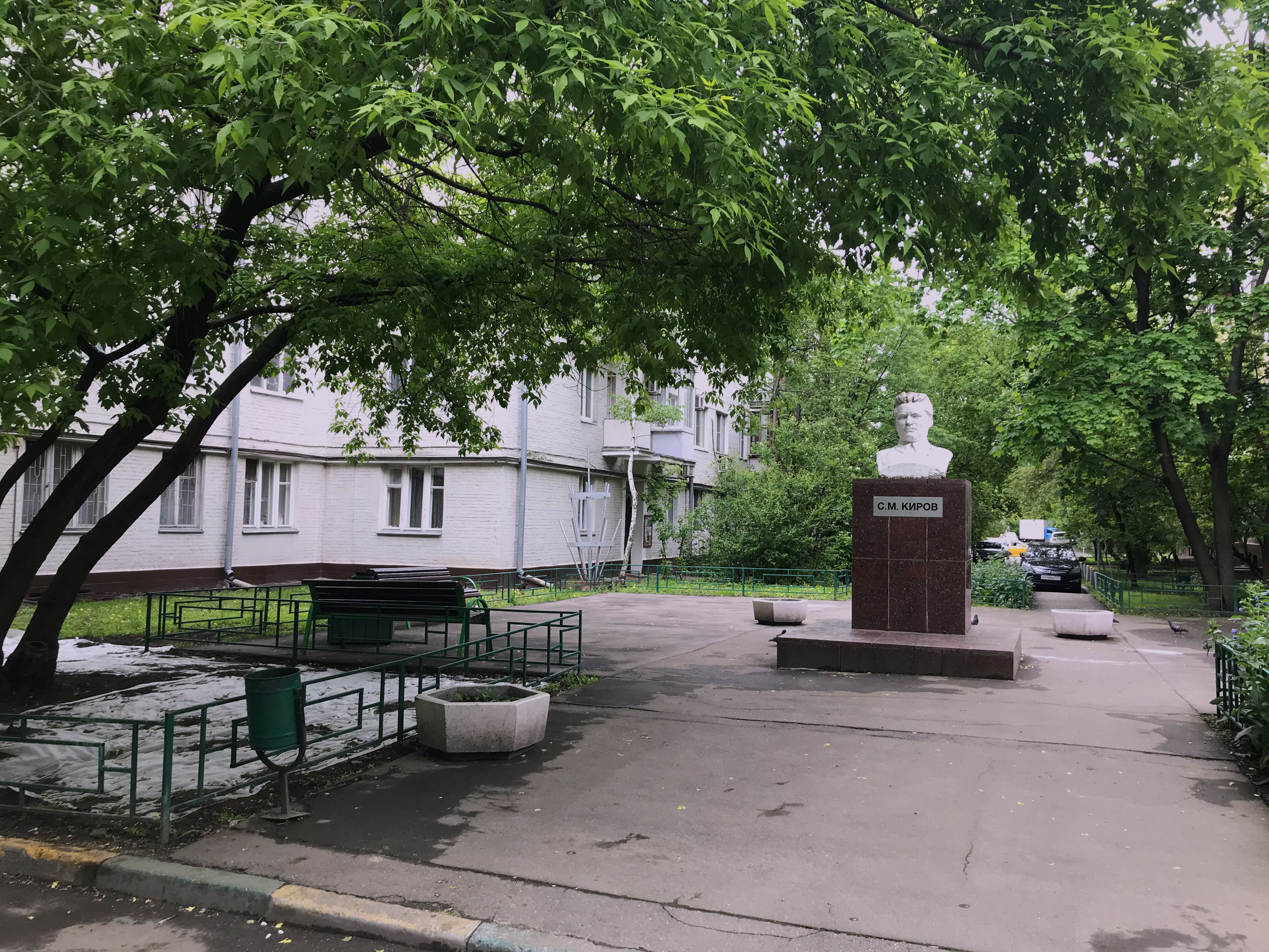 Двор и памятник С. М. Кирову